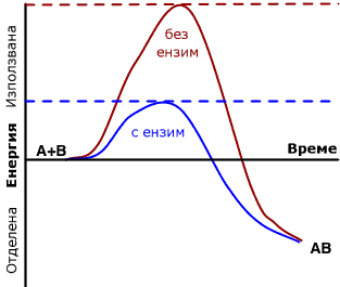 Енергия, необходима за протичане на хим. реакция чрез ензими. Автор: Петко Йотов, производна работа на основата на графика от G. Andruk (източник: :en:Image:Activation.png)